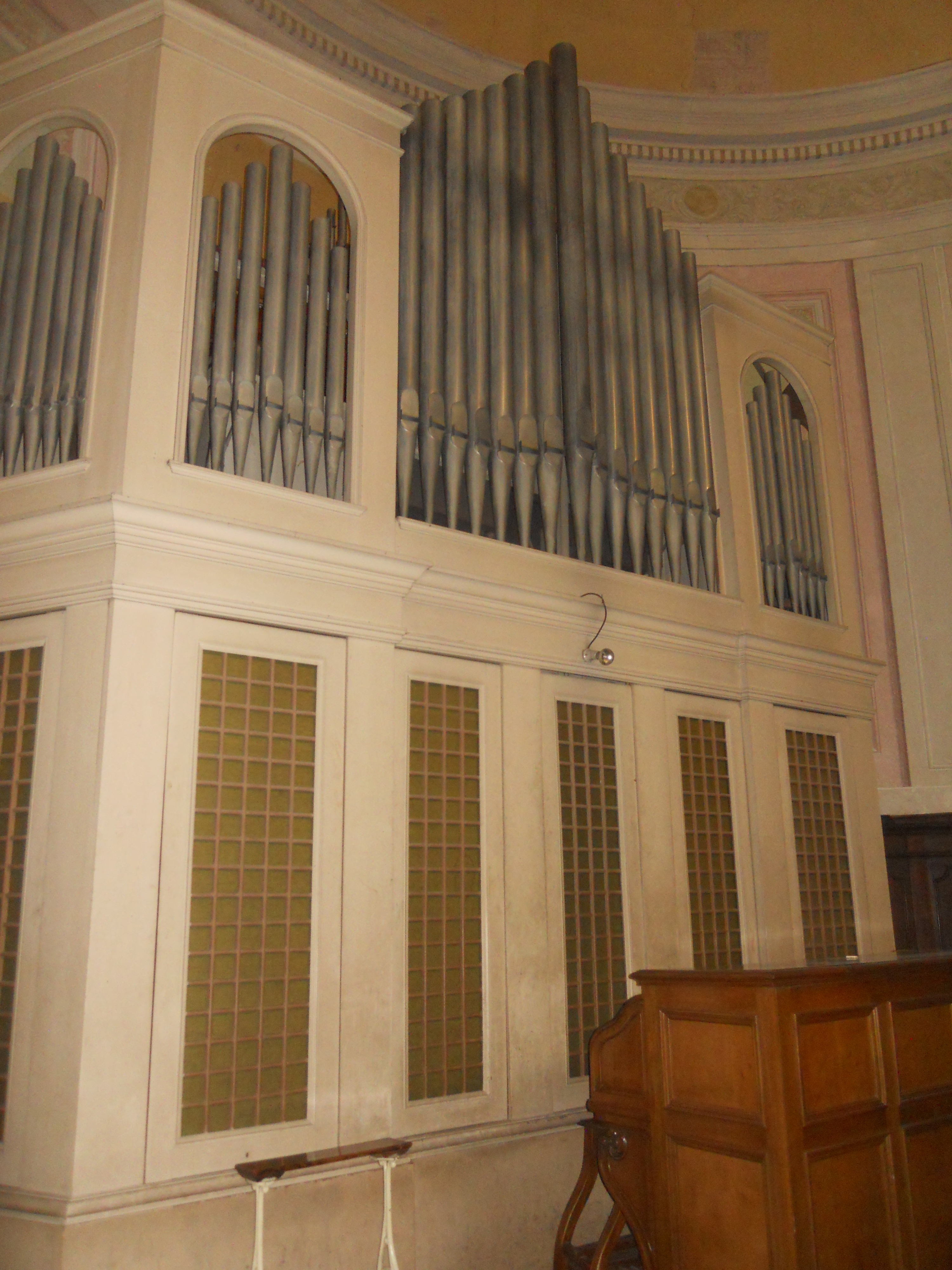 L'organo a canne Ruffatti (II+P/20) della chiesa dei Santi Lorenzo e Barbara a Seravezza